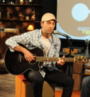 O cantor e compositor brasileiro Zeca Baleiro